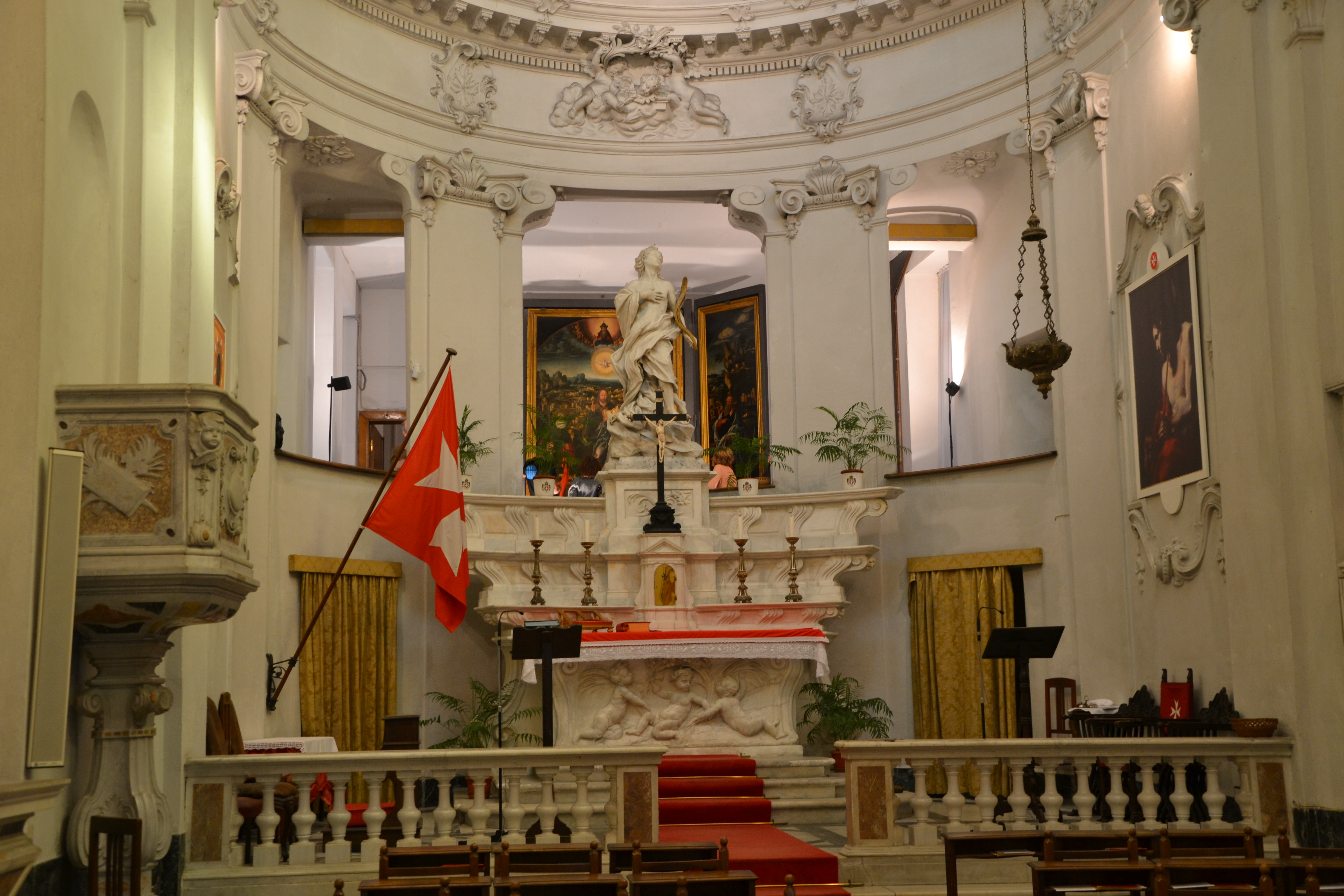 Chiesa di san Pancrazio, Genova